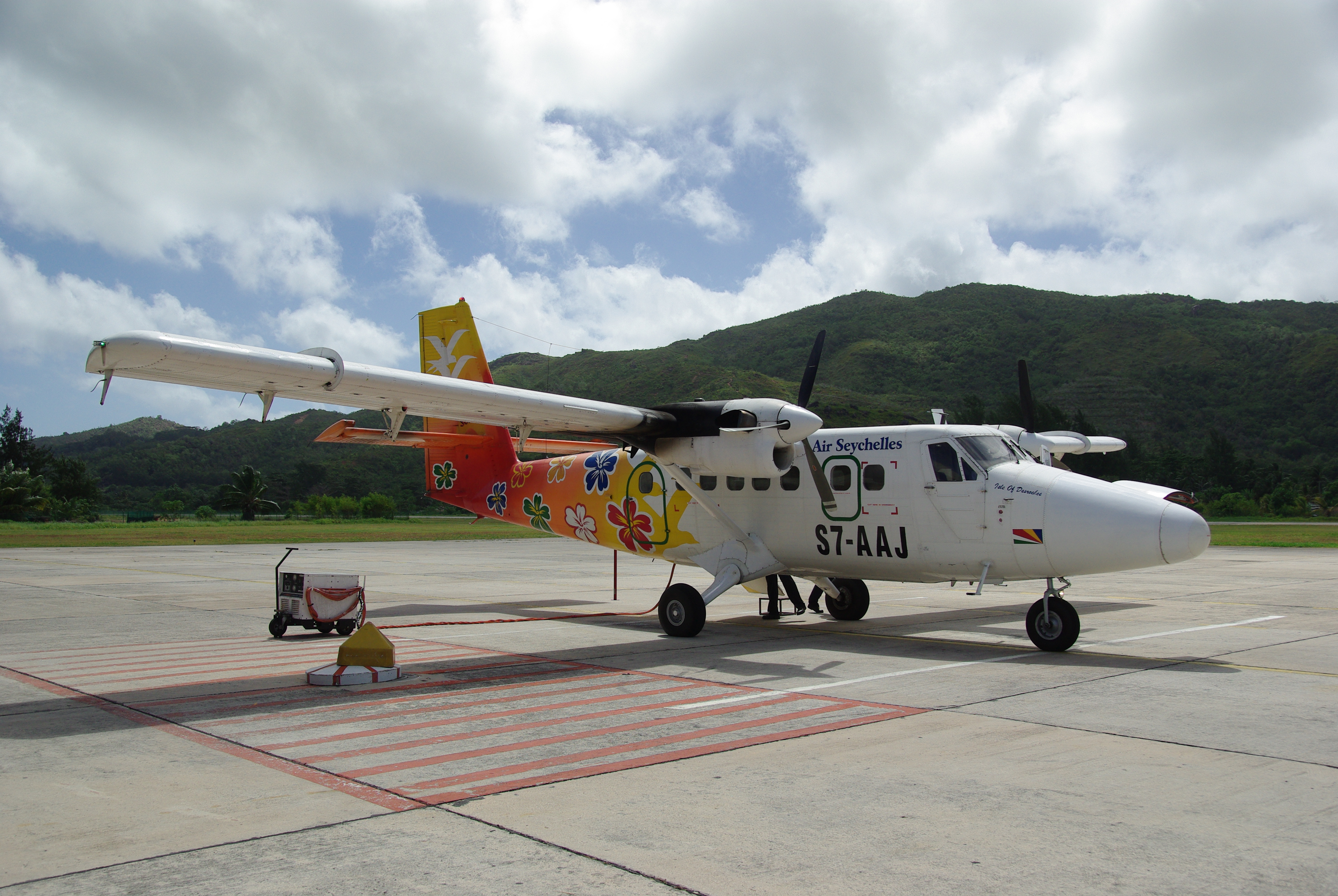 DHC-6 Twin Otter der Air Seychelles auf dem Flughafen von Praslin. Die Maschine trägt seit 2007 eine Sonderbemalung zum 30-jähren Jubiläum der Unabhängigkeit der Seychellen.